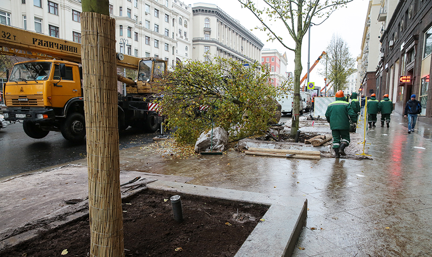 Первая высадка лип на Тверской улице (октябрь 2016)